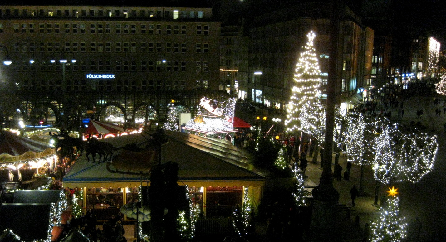 Weihnachtsmarkt auf dem Hamburger Rathausmarkt, rechts die Mönckebergstraße